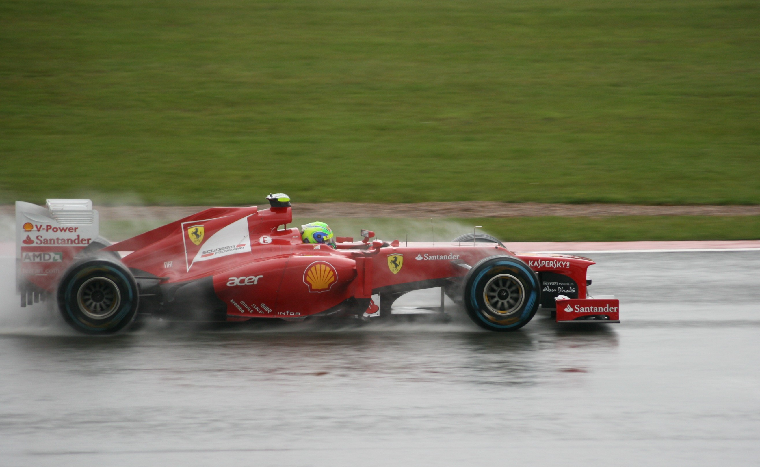 Felipe Massa, Ferrari F2012